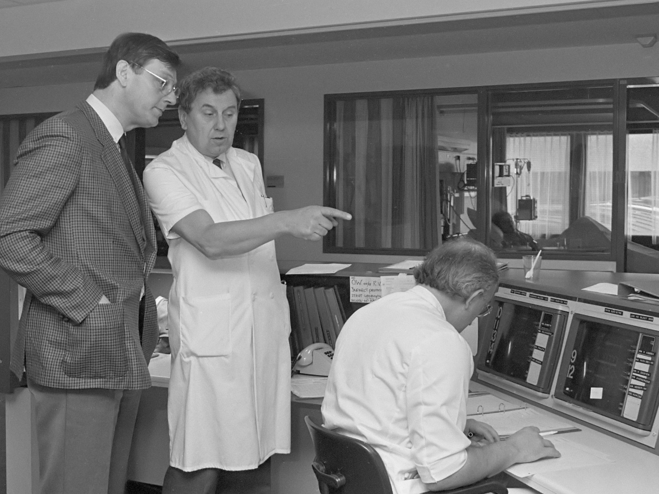 Opdracht Financieel Dagblad , algemeen directeur AMC de heer J. Werner 4 maart 1987